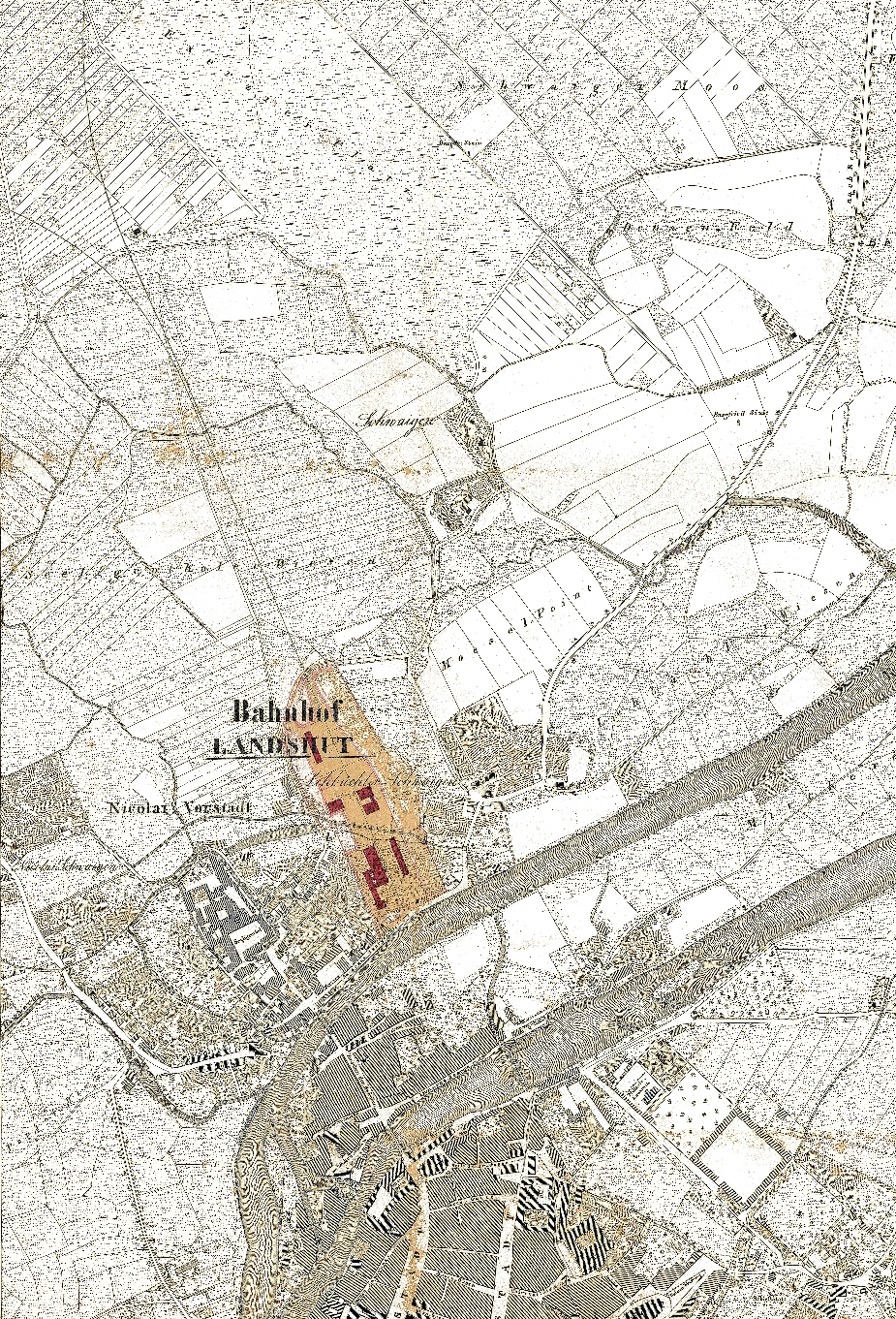 Markierung des Bahngeländes in einer Kataster-Karte von 1847.